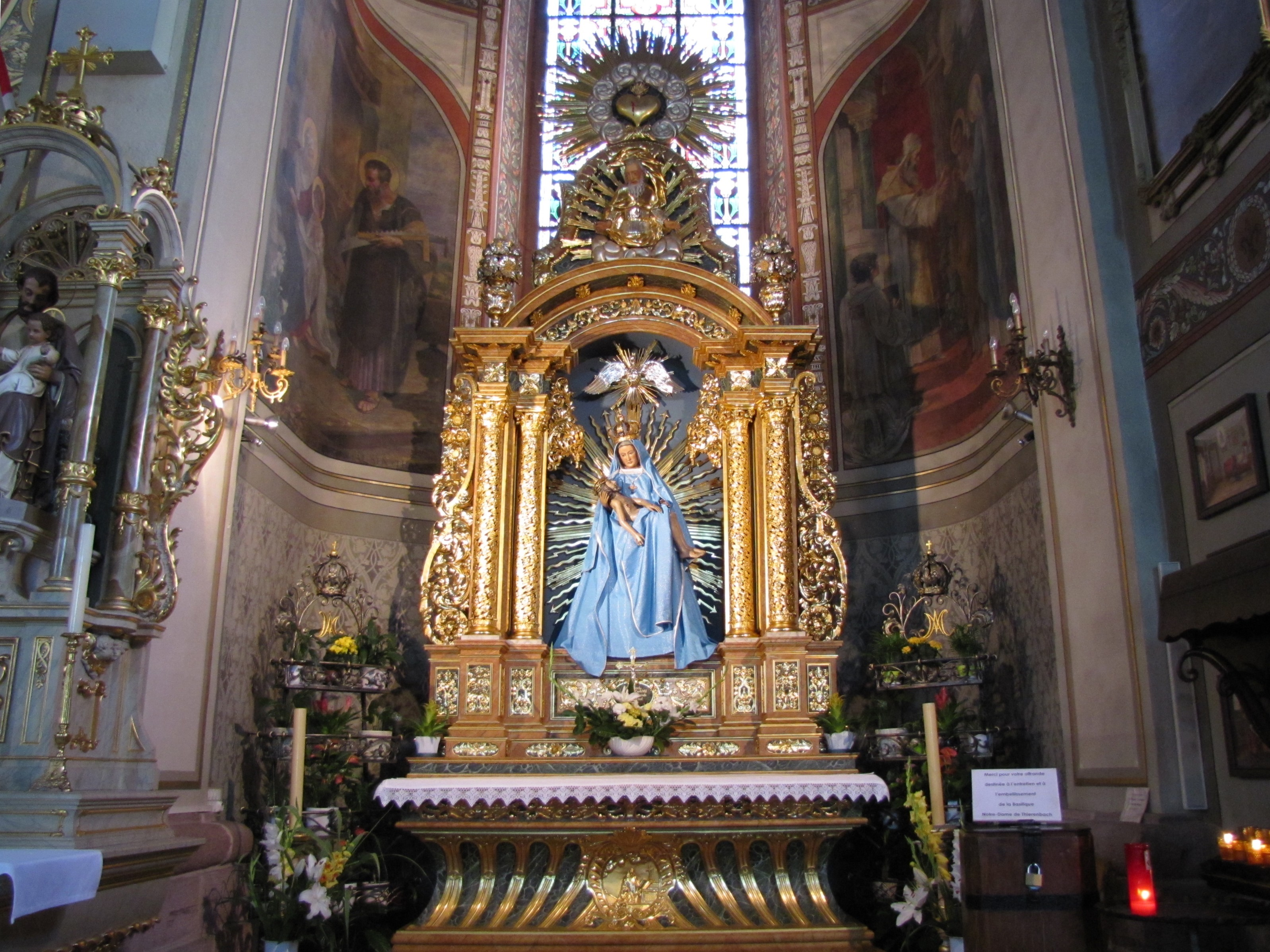 Alsace, Haut-Rhin, Jungholtz, Basilique Notre-Dame (1723) de Thierenbach (PA00085469, IA00111918). Autel secondaire "Vierge de Thierenbach" (1725): This object is classé Monument Historique in the base Palissy, database of the French furniture patrimony of the French ministry of culture, under the references PM68000454 and IM68003945.